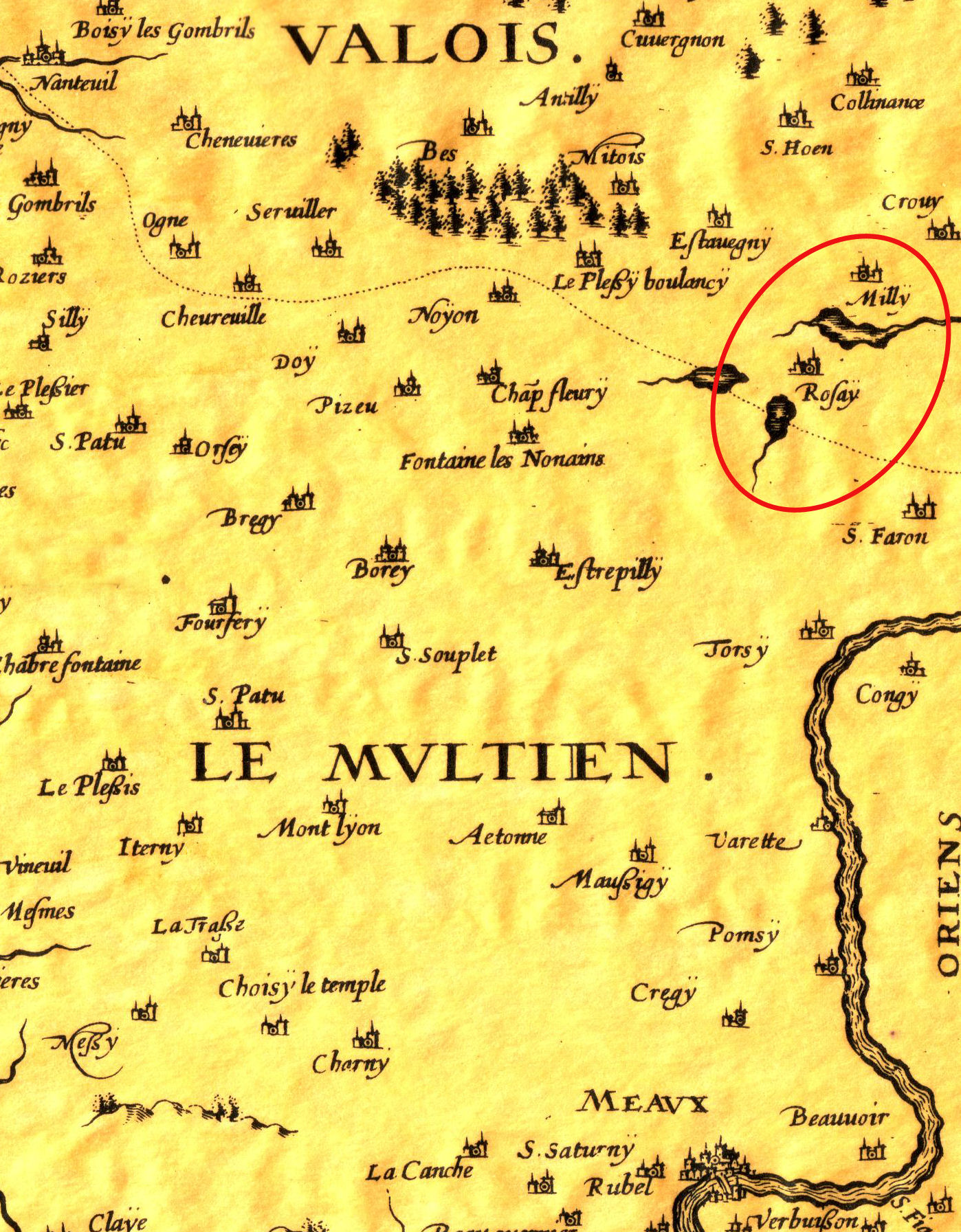 Position approximative de Rosoy et Milly dans le Multien. Acy n'est pas représenté ici.